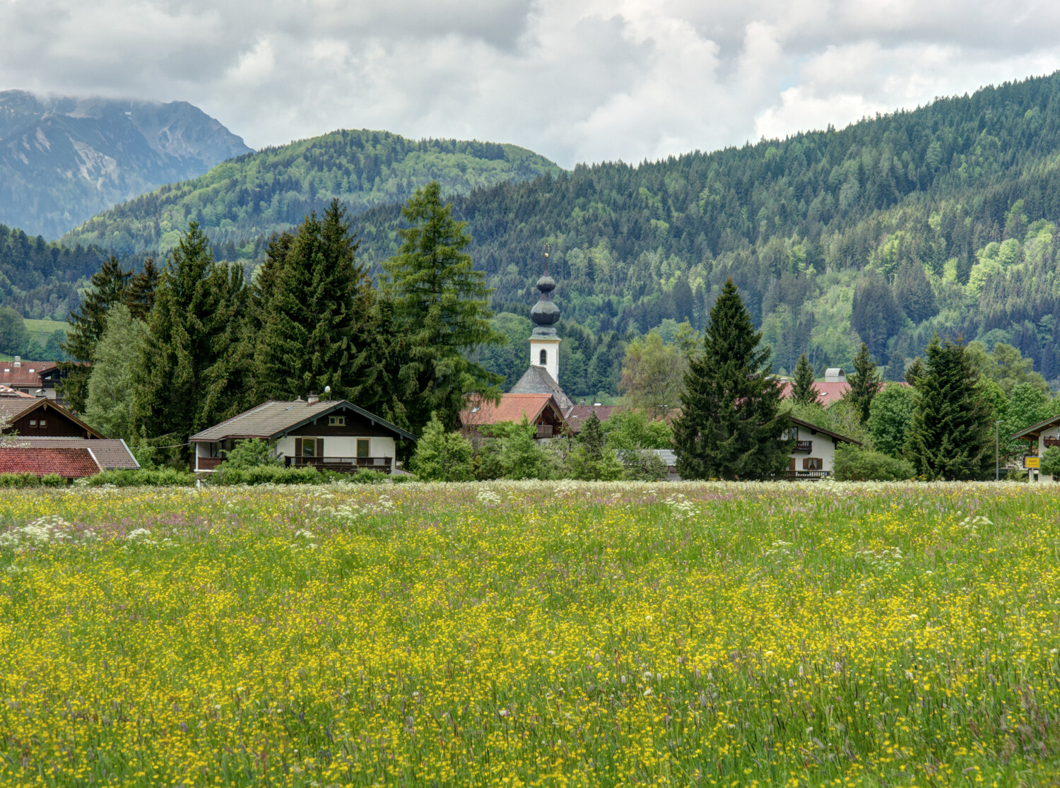 Inzell Panorama Kirche St. Michael